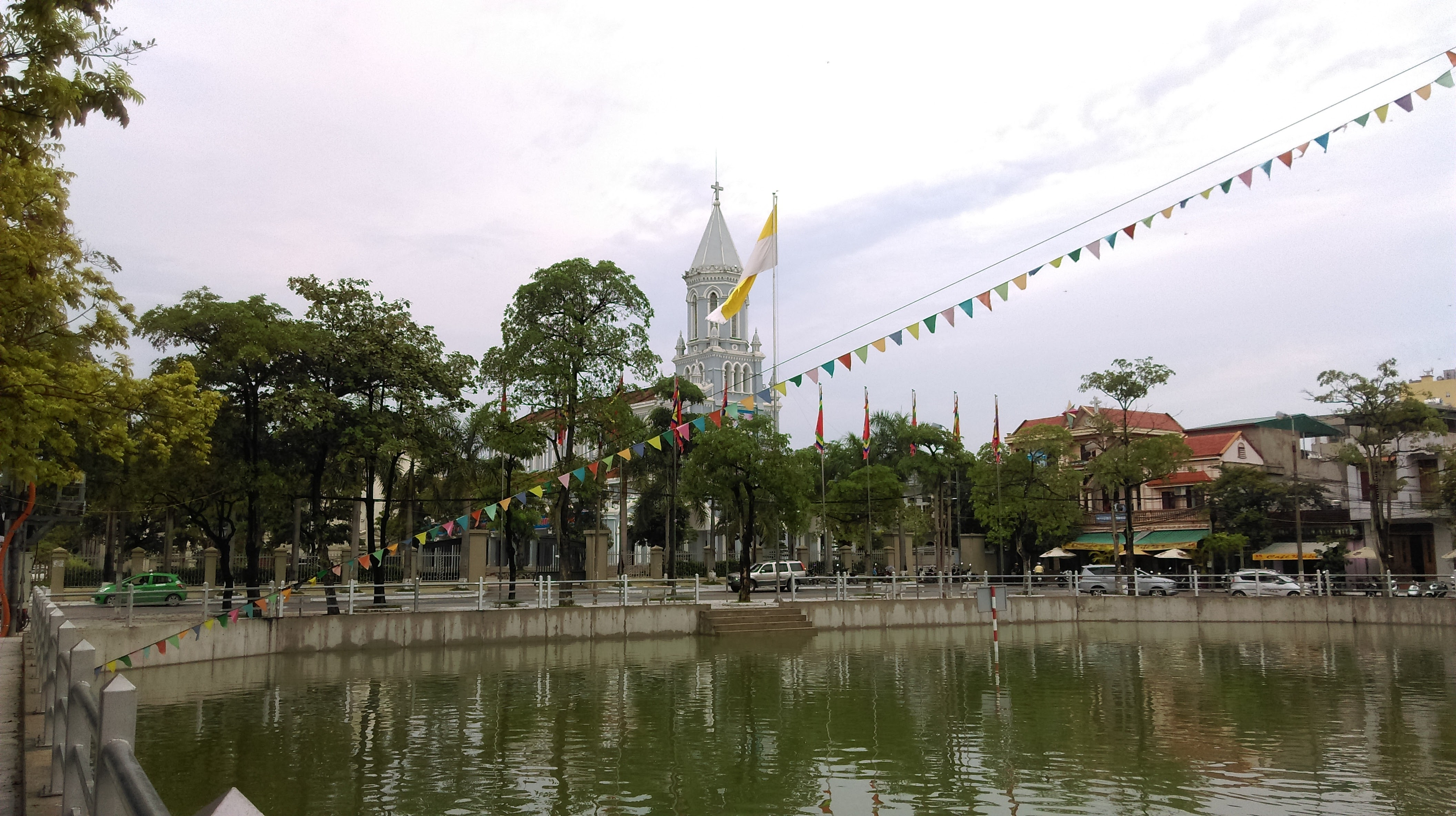 Nhà thờ Chính tòa Thanh Hóa